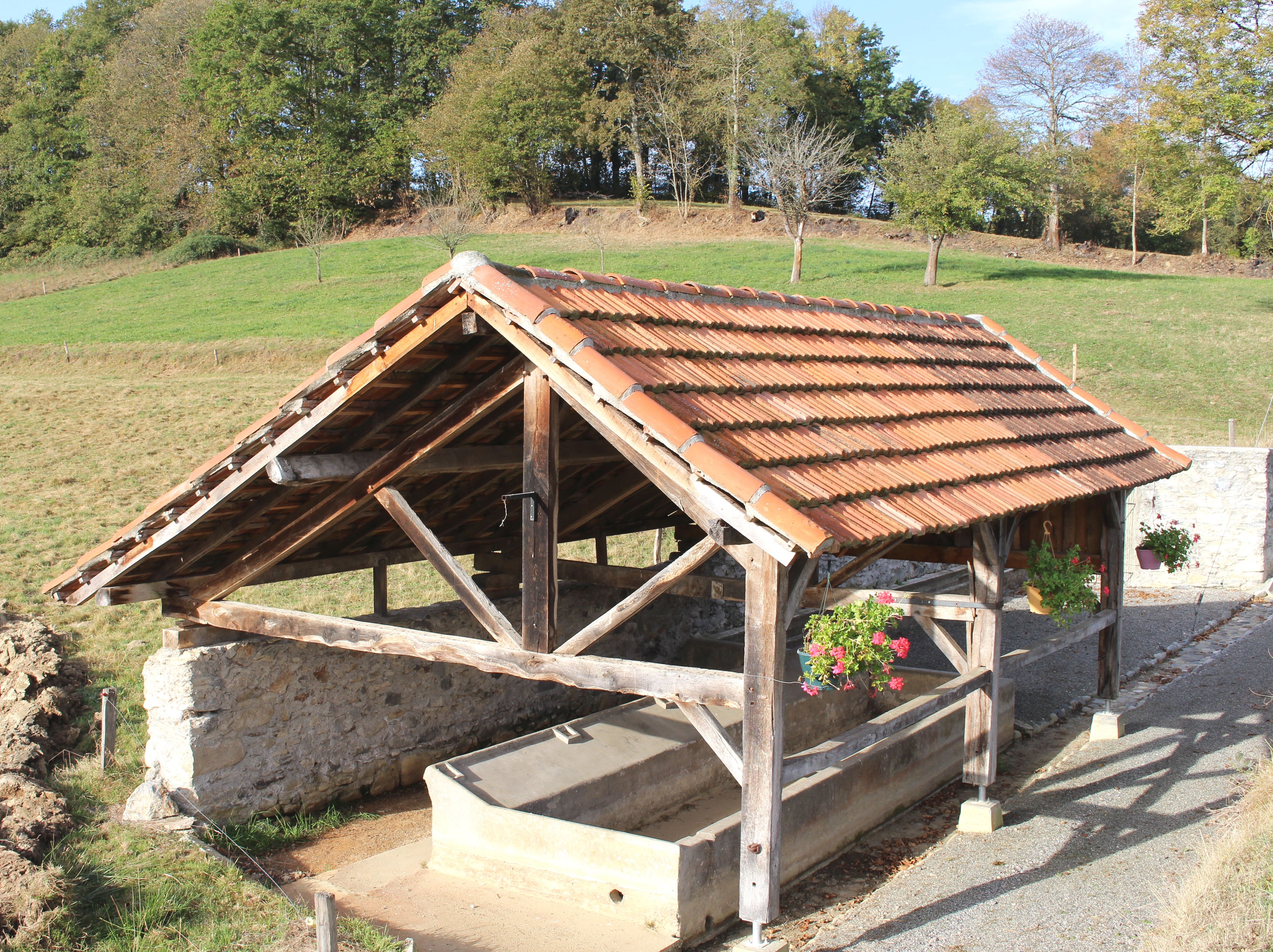 Lavoir de Montoussé (Hautes-Pyrénées)